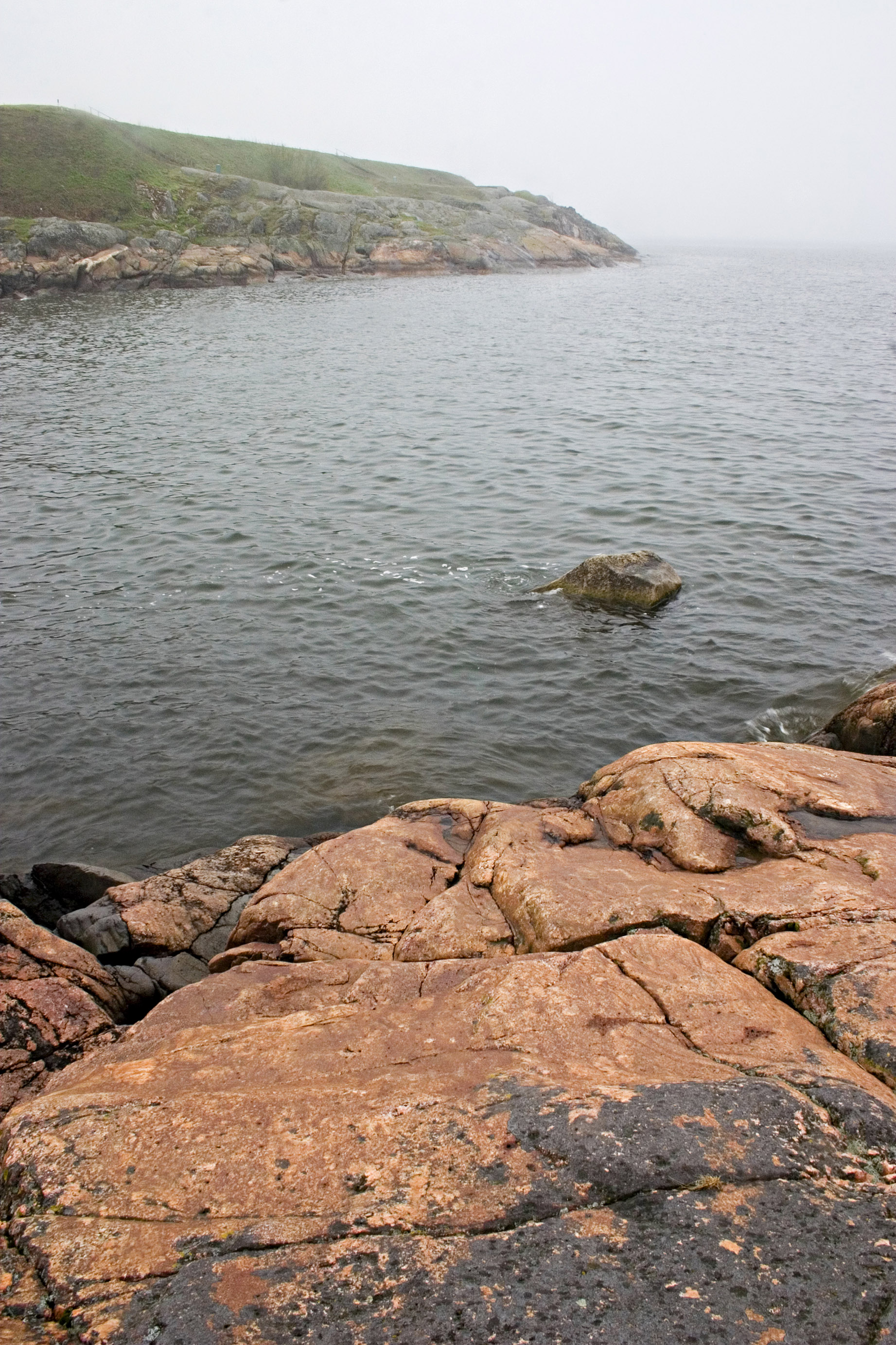 Suomenlinnan ranta